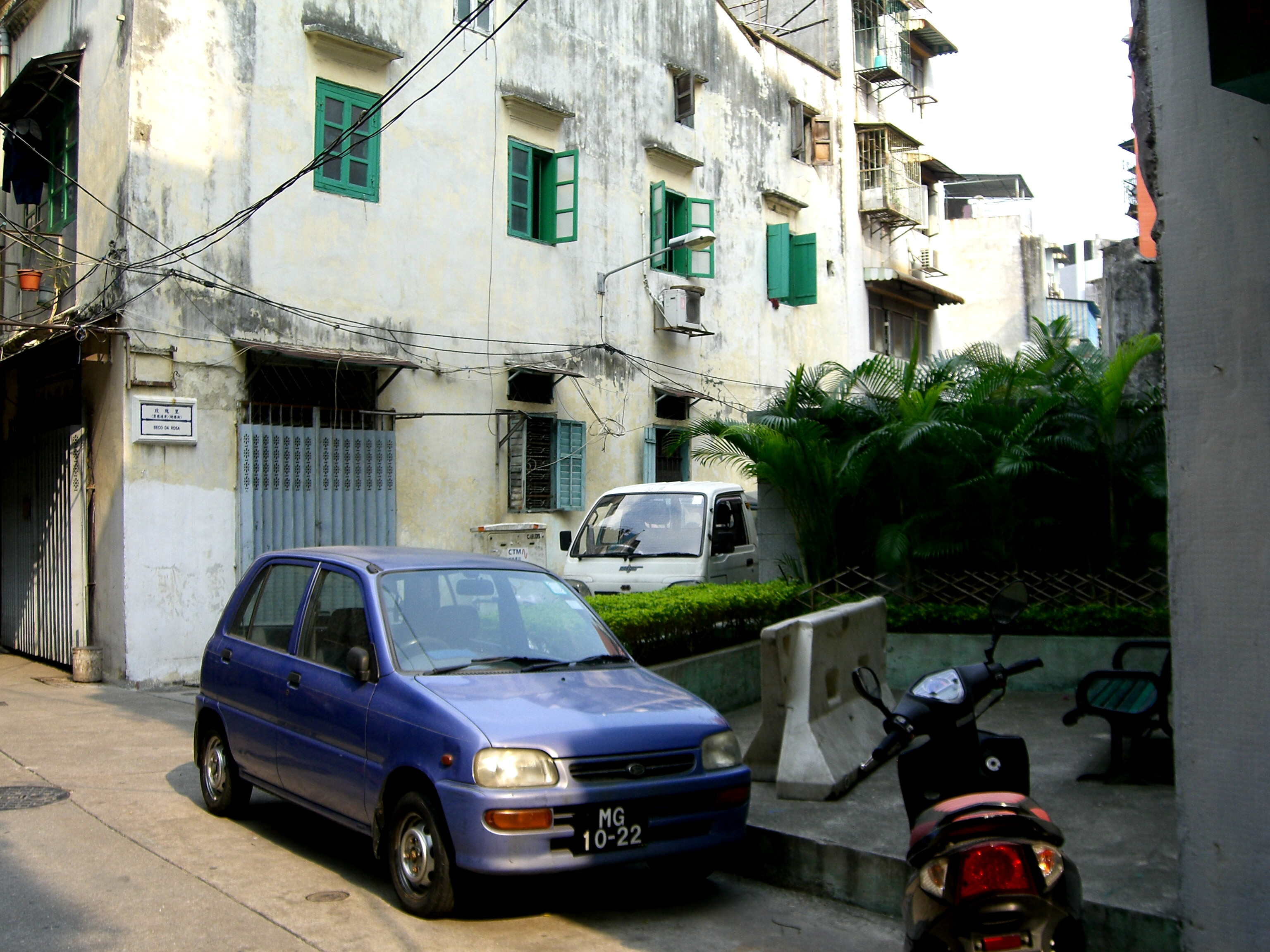 Beco da Rosa